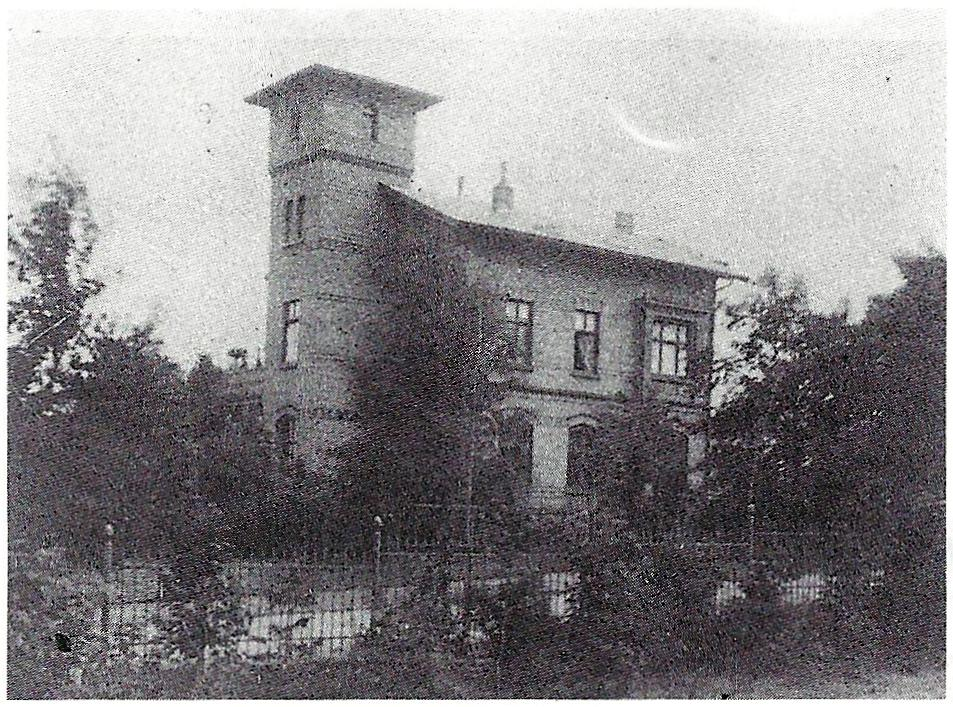 Ehemaliges Rathaus der Gemeinde Rondorf (1879–1888; erbaut 1878/79, 1929 abgebrochen), Marienburger Straße 7, Köln-Marienburg